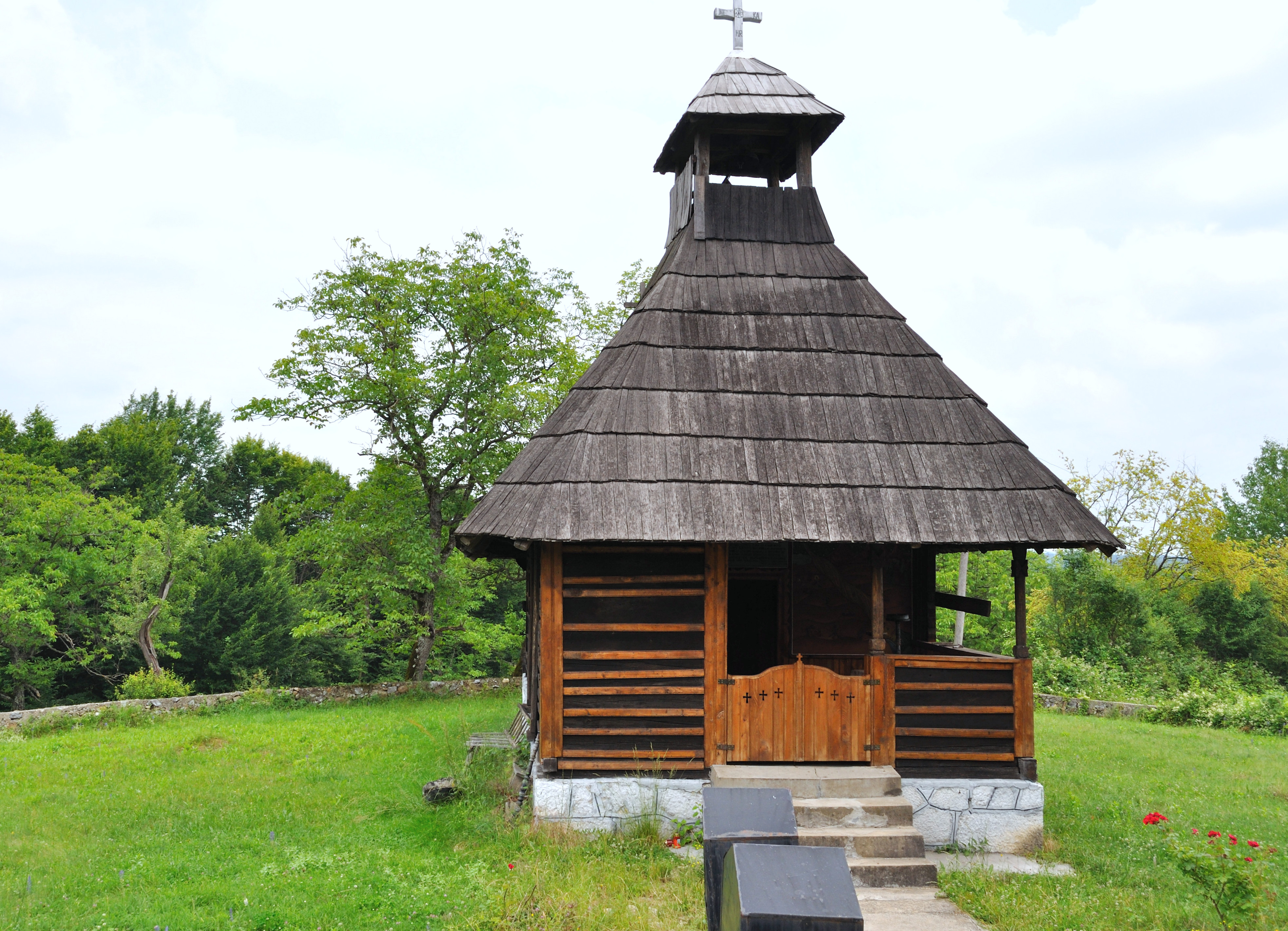 Biserica de lemn „Nașterea Maicii Domnuluii” din Gornovița, județul Gorj